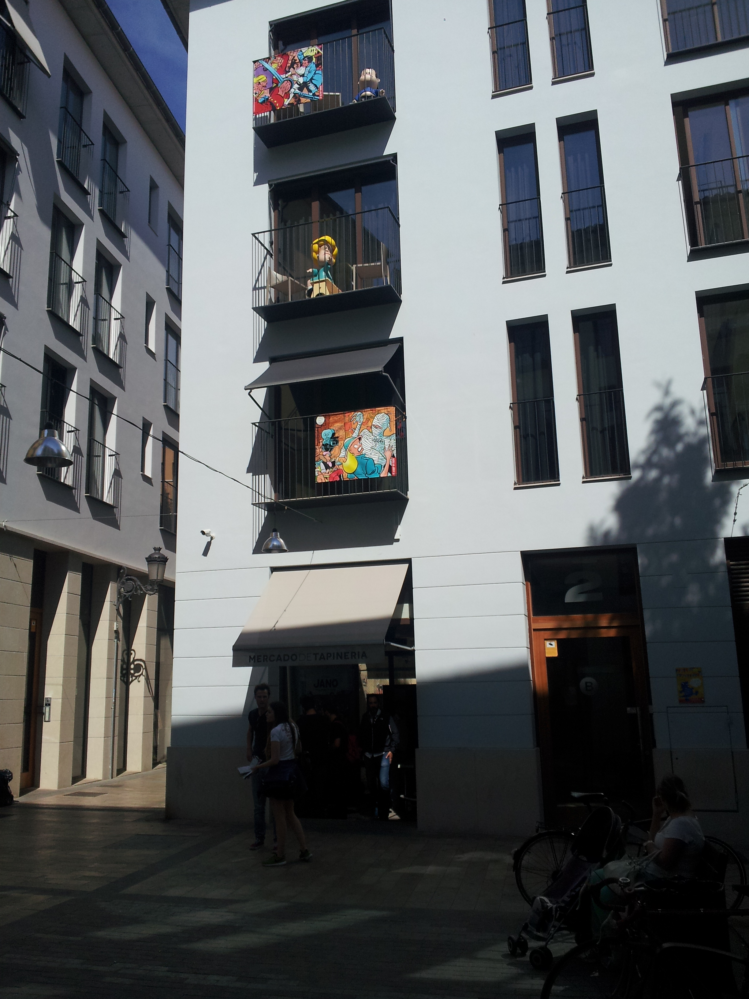 Façanes de tapineria.